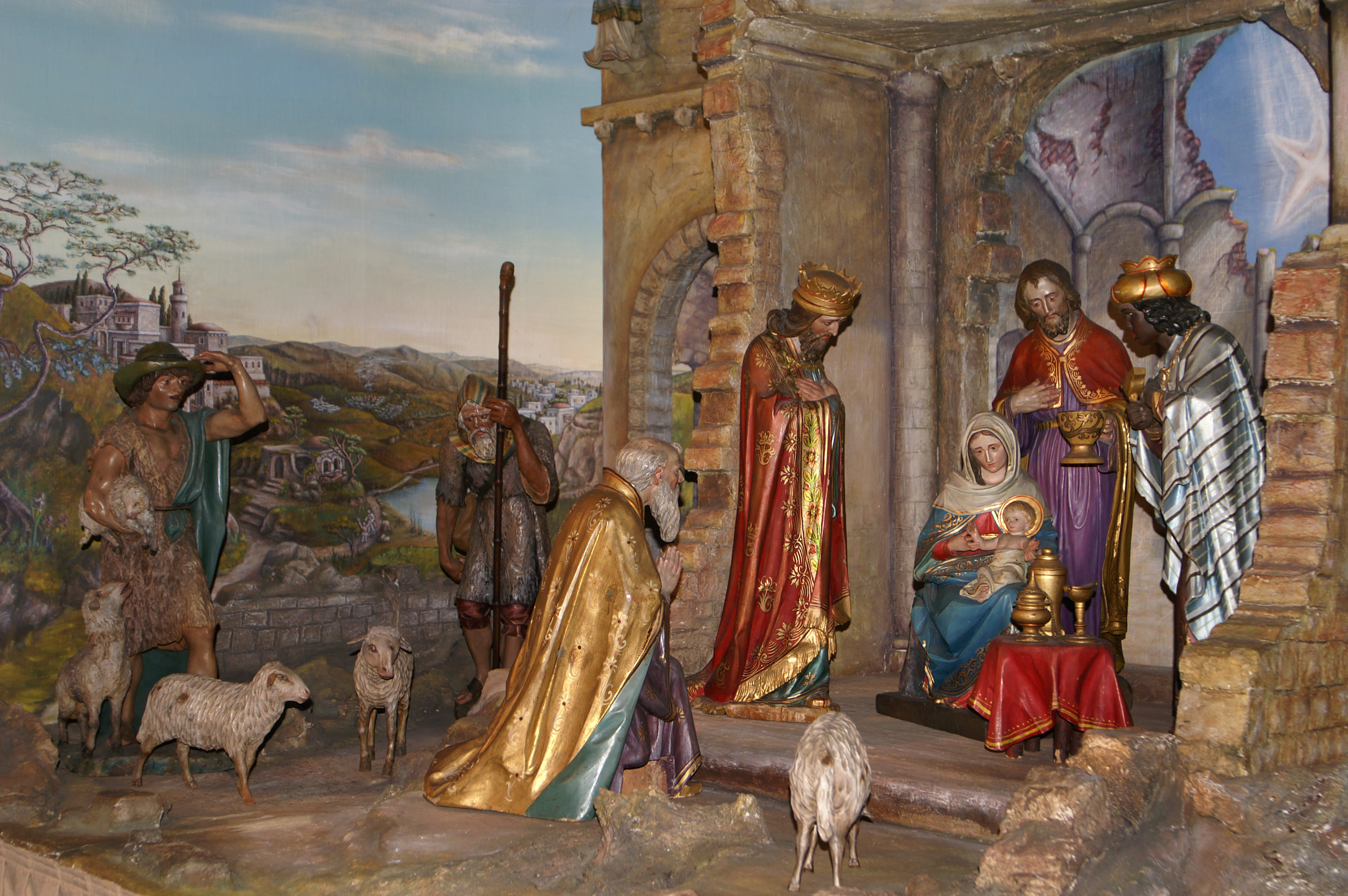 Weihnachtskrippe in der Pfarrkirche hl. Nikolaus, Wolfurt. Wandbemalung bez. E.Bell 1987 * Krippe Peter Mayrhofer * Figuren von Ars Sacra 1875 Ferdinand Stuflesser um 1900 aus Gröden (Südtirol) * gestiftet von Franziska Dür 1913.